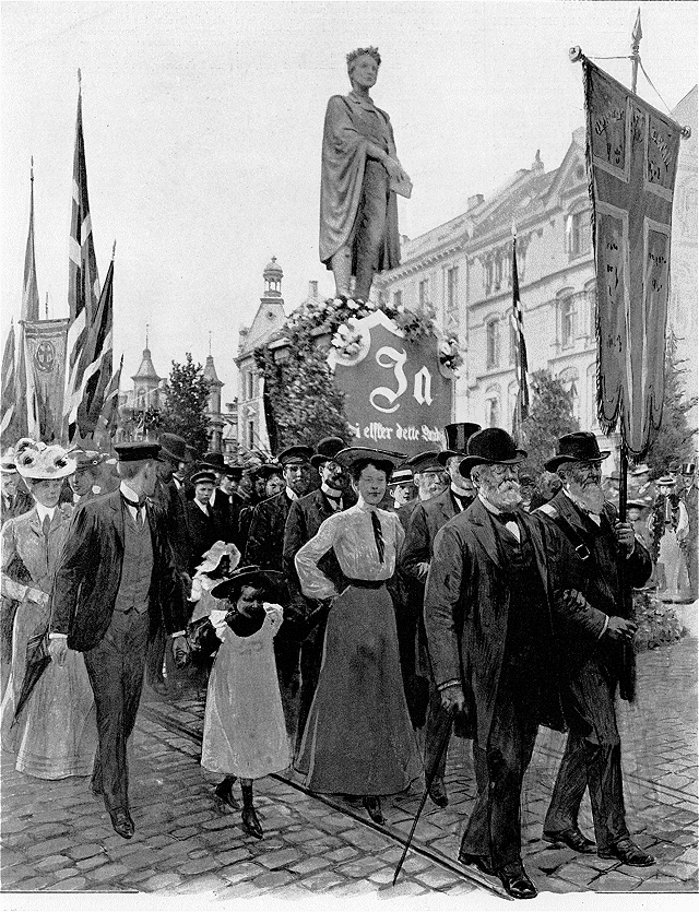 Défilé en faveur du oui lors du référendum de 1906 pour la scission de la Norvège d'avec la Suède